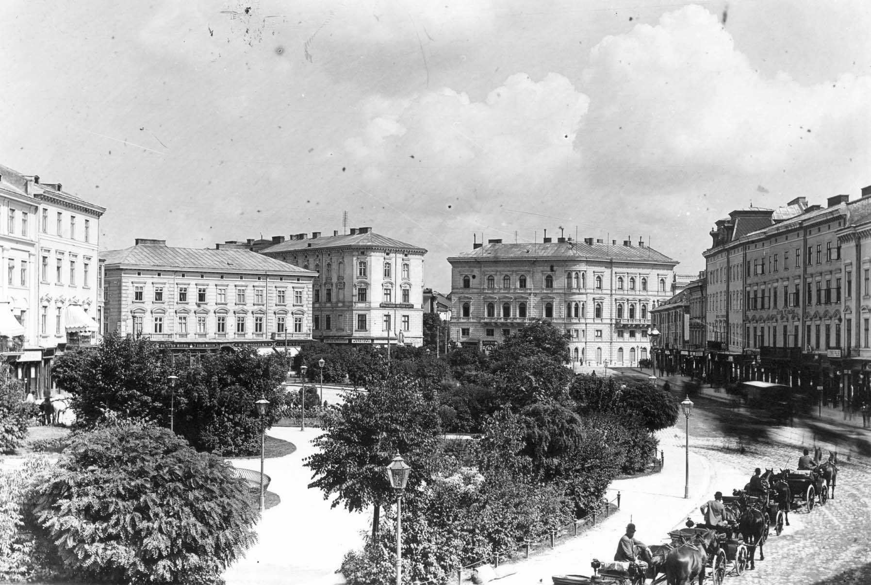 Площа Міцкевича у Львові до 1904 року. Автор Едвард Тшемеський (згідно з інфомацією поданою у книзі Prokopovych M. Habsburg Lemberg: Architecture, Public Space, and Politics in the Galician Capital, 1772-1914. - P 176. - ISBN-13: 978-1-55753-510-8.